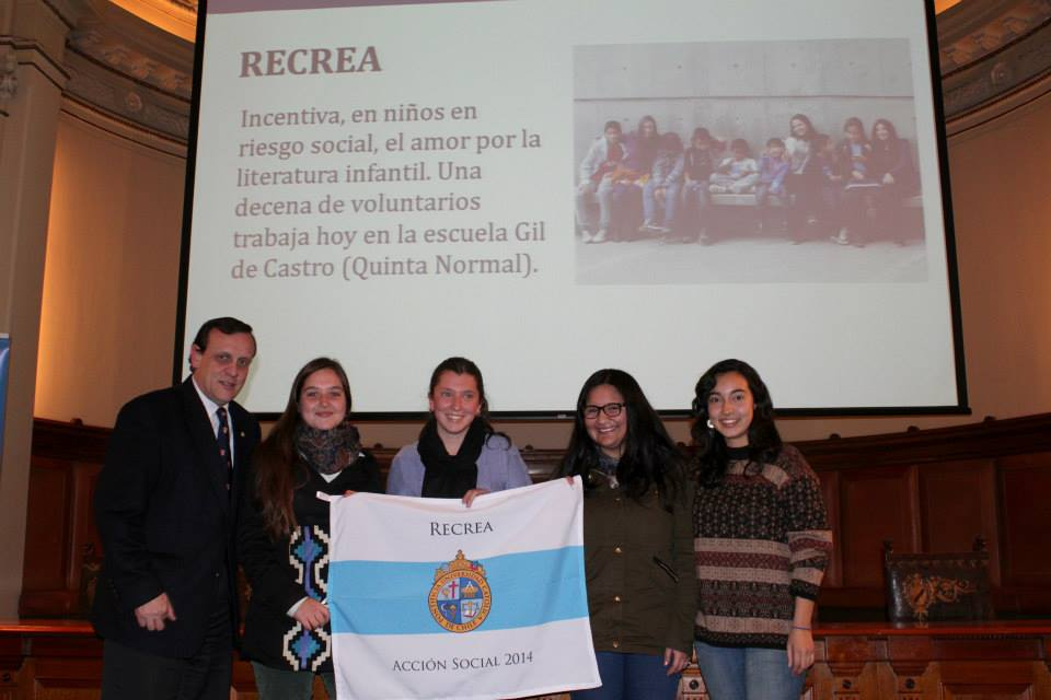 Con el rector Ignacio Sanchez